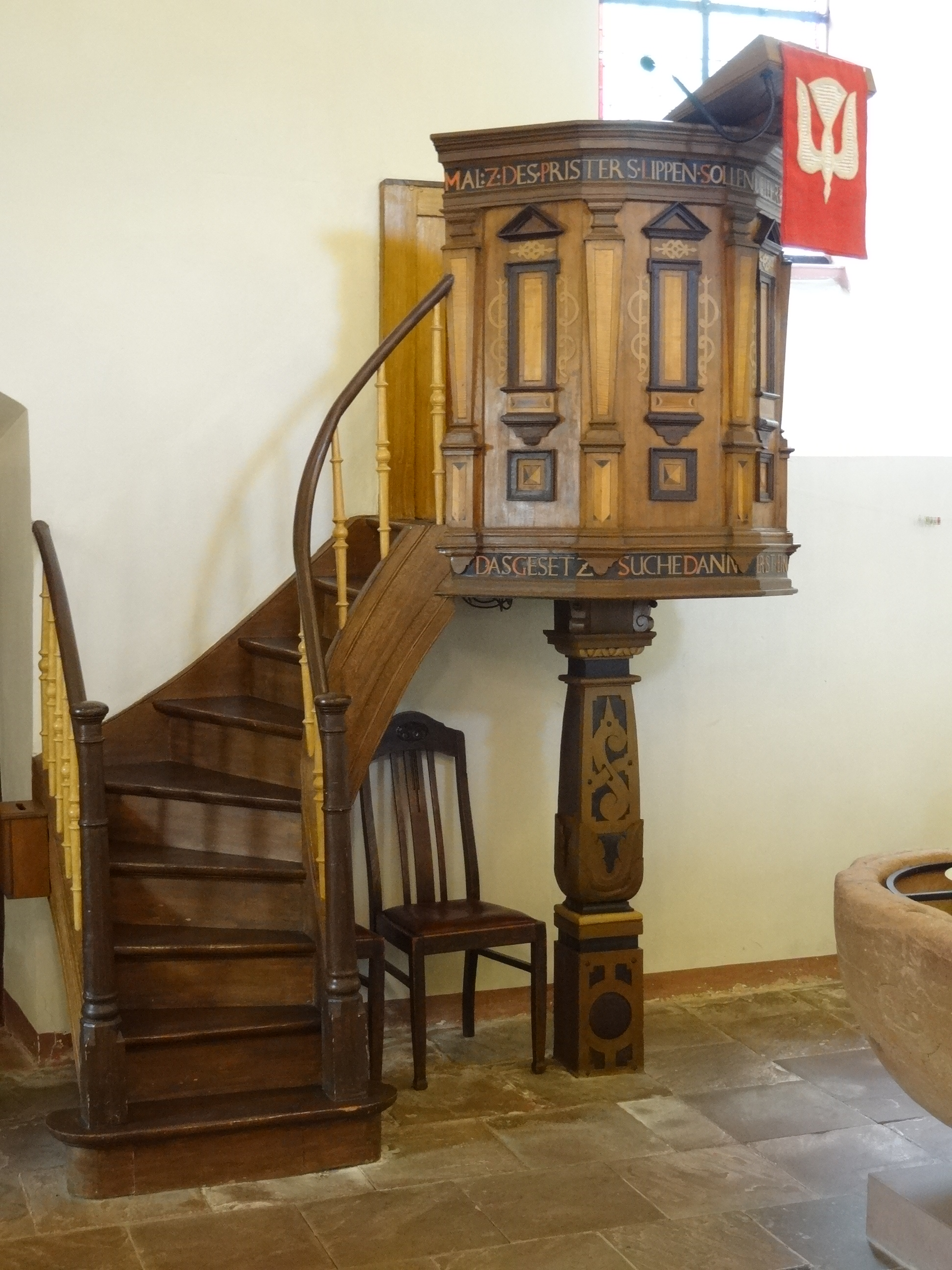 Evangelische Pfarrkirche (Nieder-Weisel)